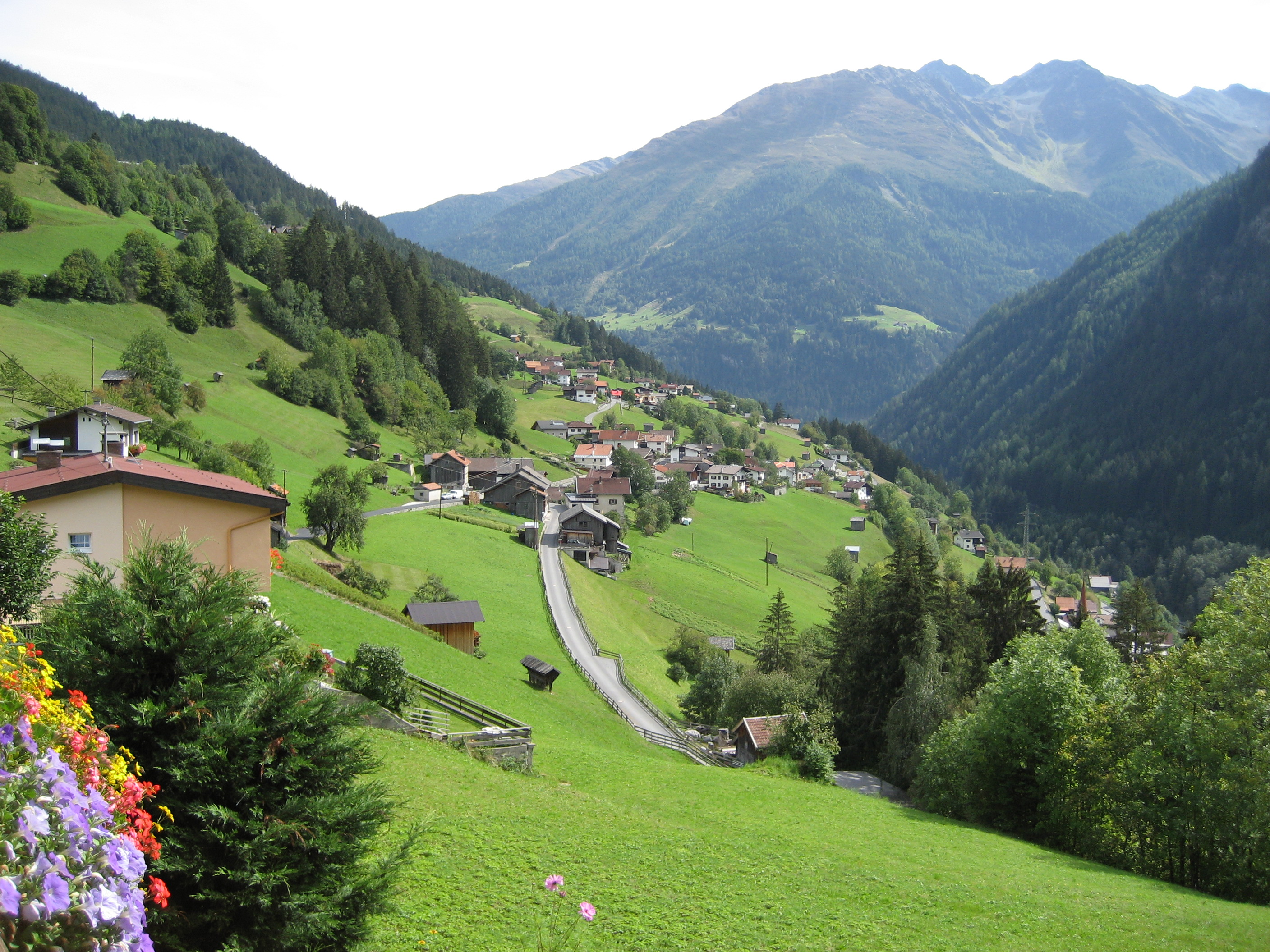 Blick auf Teile der Weiler Balzerlen (links), die Weiler Grießhof und Brunnen (Bildmitte) und einen kleinen Teil des Dorfzentrums (rechts unten)